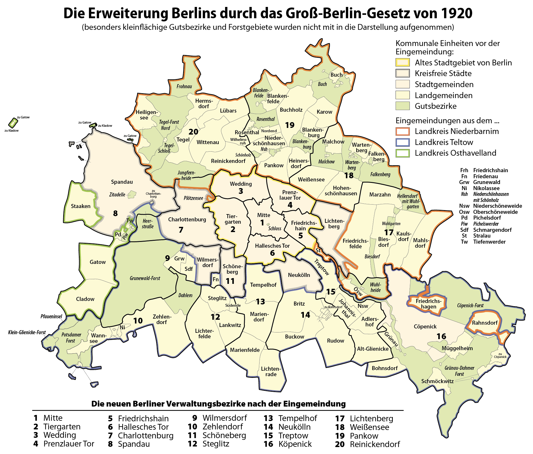 Karte: Die Erweiterung Berlins durch das Groß-Berlin-Gesetz von 1920